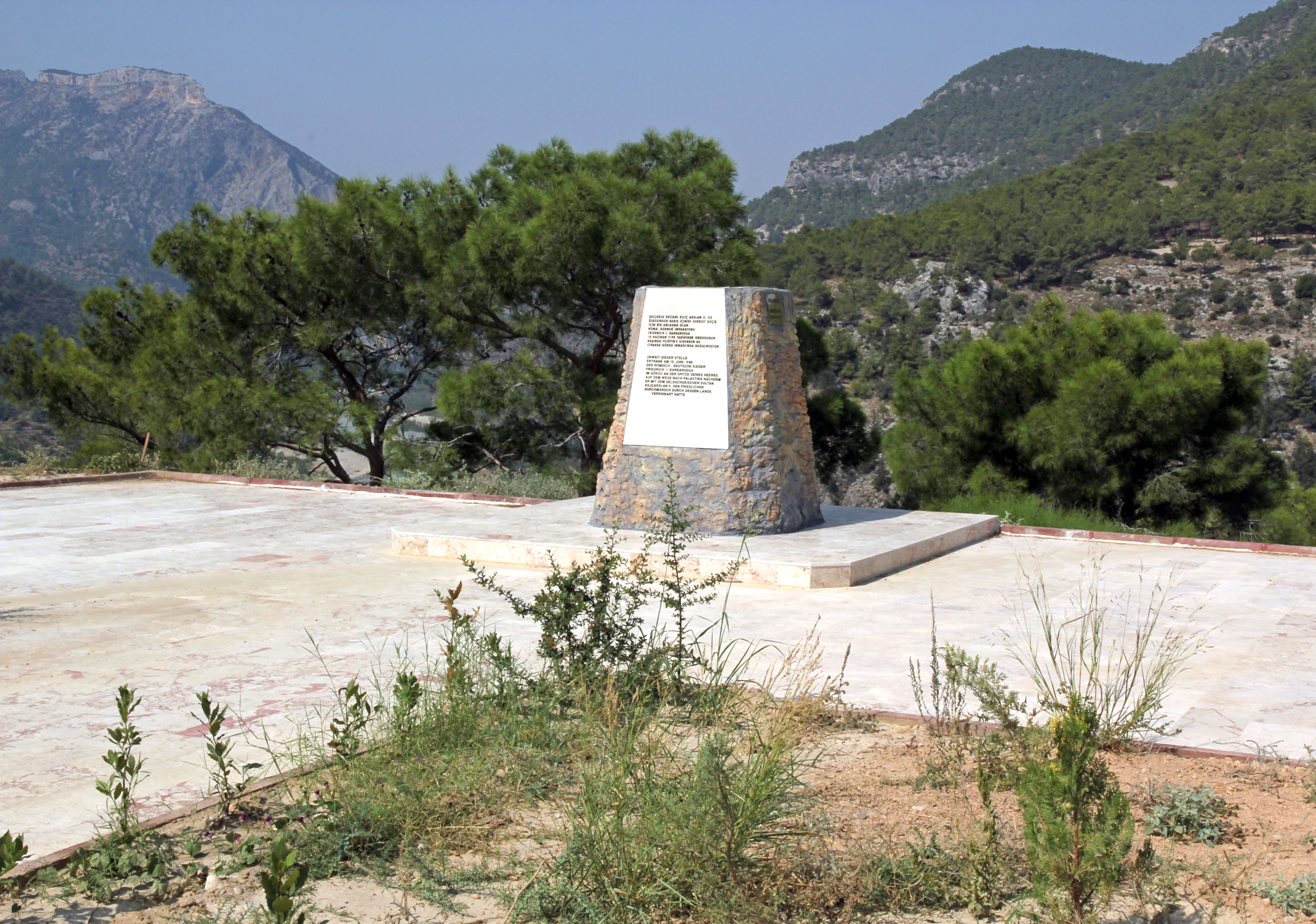 Gedenkstein für Kaiser Friedrich Barbarossa am Fluss Saleph (heute Göksu) nahe Silifke, Südtürkei